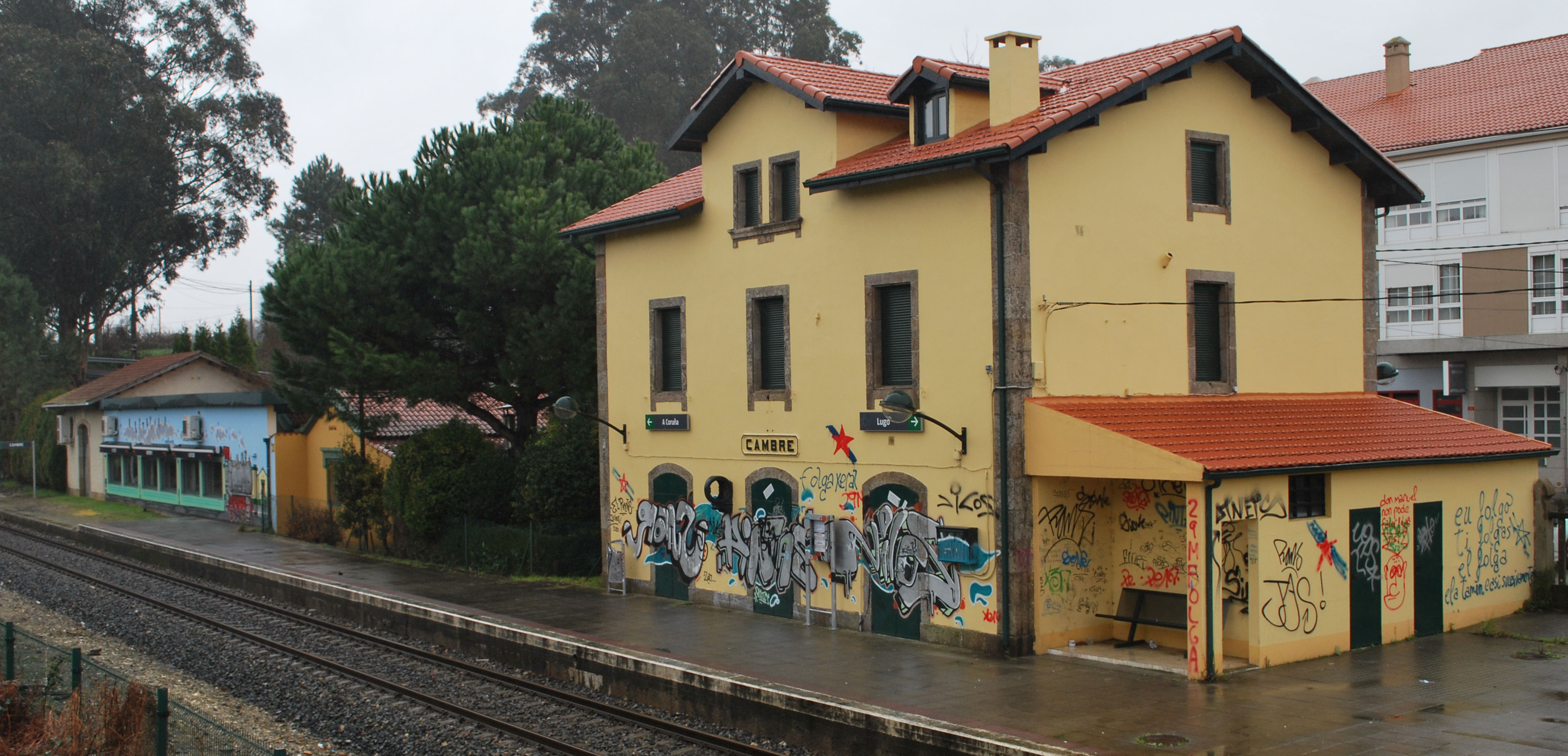 Estación de Cambre, A Coruña Betanzos Infesta Galiza.